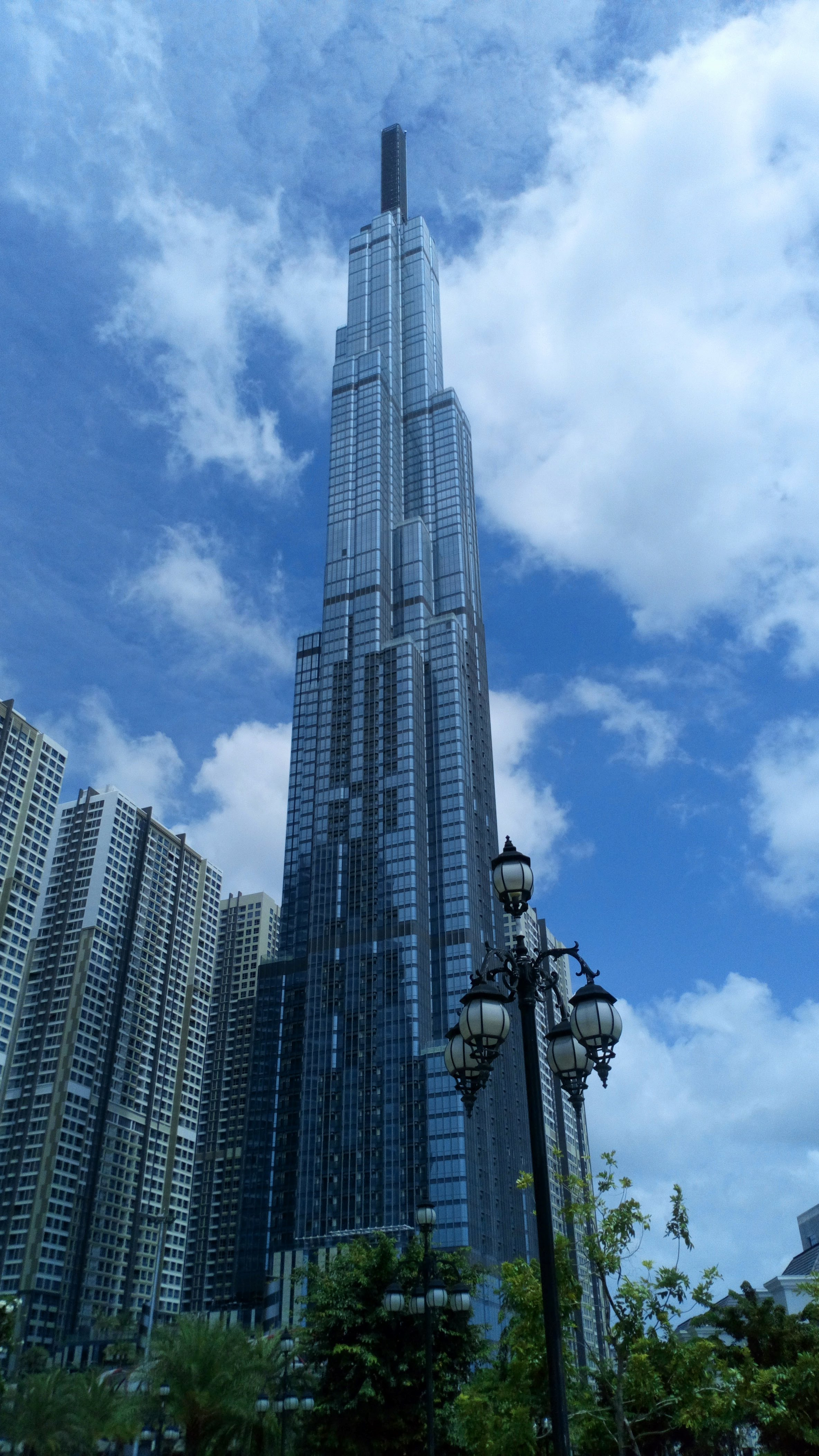 Tòa tháp nhìn từ Công viên